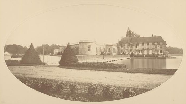 Le château de Chantilly : état avant la reconstruction du duc d'Aumale. Photographie de Claude Couton (première moitié du XIXe siècle)